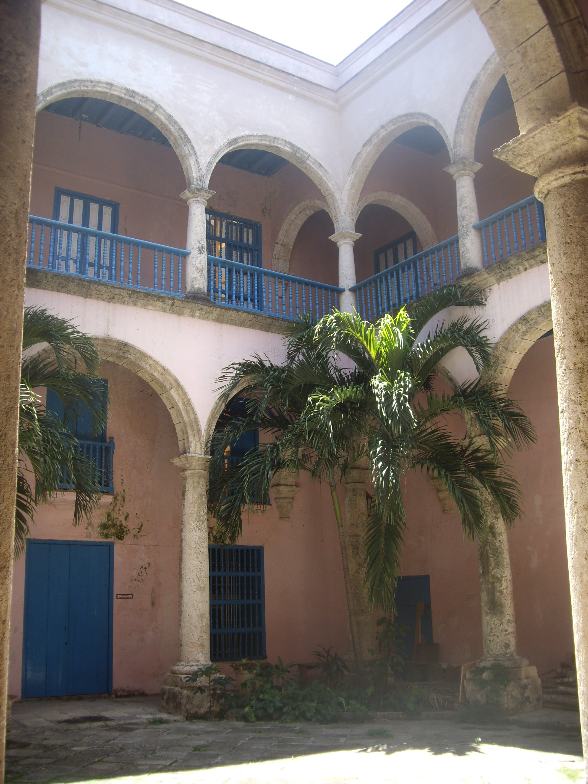 Pati de la casa del comte de Jaruco a la Plaza Vieja